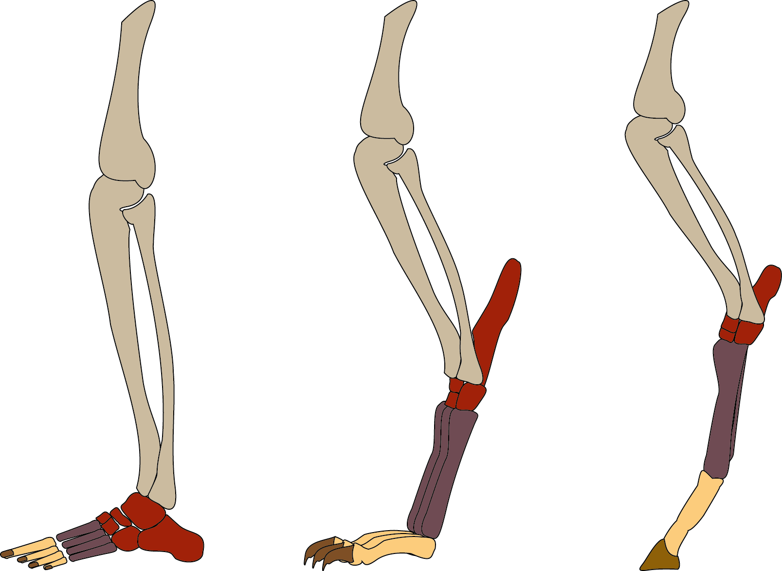 Les différents types de locomotions chez les amniotes. De gauche à droite : plantigrade, digitigrade et onguligrade. En rouge le basipode, en viollet le métapode, en jaune les phalanges, en marron les phanères terminales kératinisée.